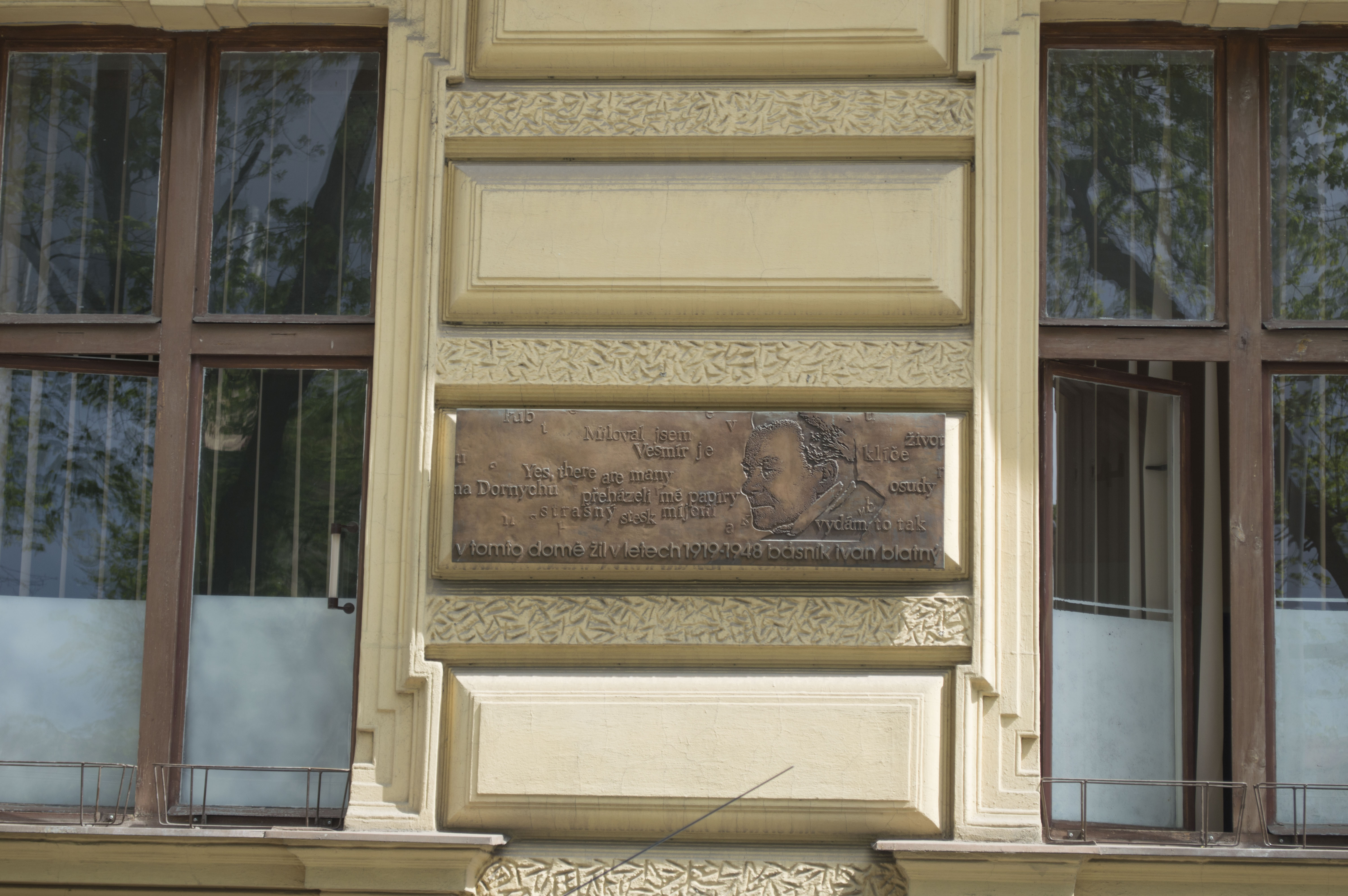 Obilní trh, Brno - dům č. 4, pamětní deska (Ivan Blatný)